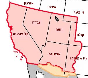 שטחים שסופחו לארצות הברית במלחמת מקסיקו. מבוסס על תמונה:Wpdms mexican cession.jpg מהוויקי האנגלית + כיתובים שלי